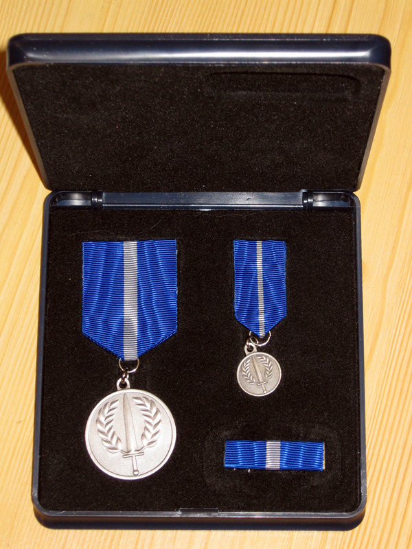 Forsvarets medalje for internasjonale operasjoner i boks med miniatyr og båndstripe